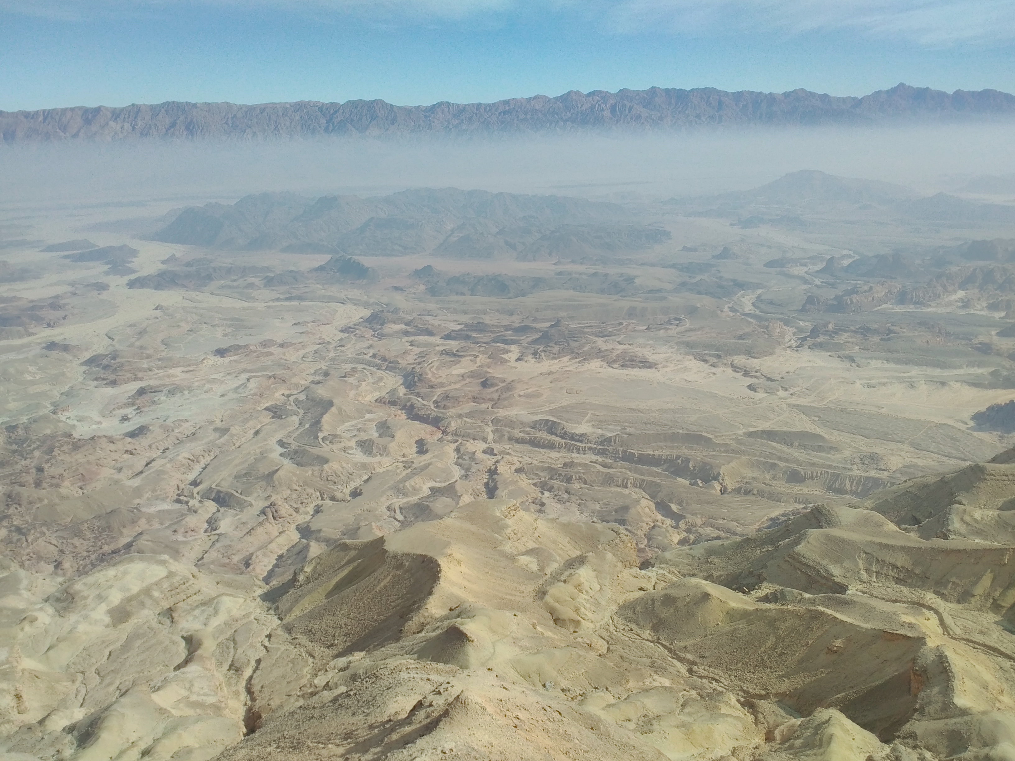 IMG_20180110_130537.jpg